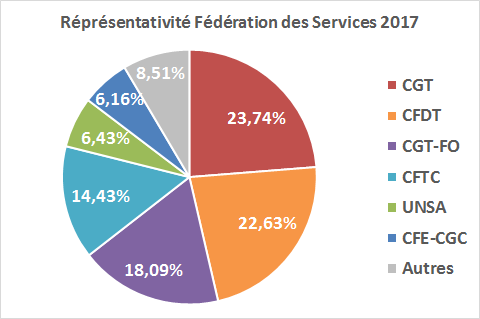 Représentativité dans le champs de la Fédération des Services telle que présentée par la DGT au HCDS le 31 mars 2017